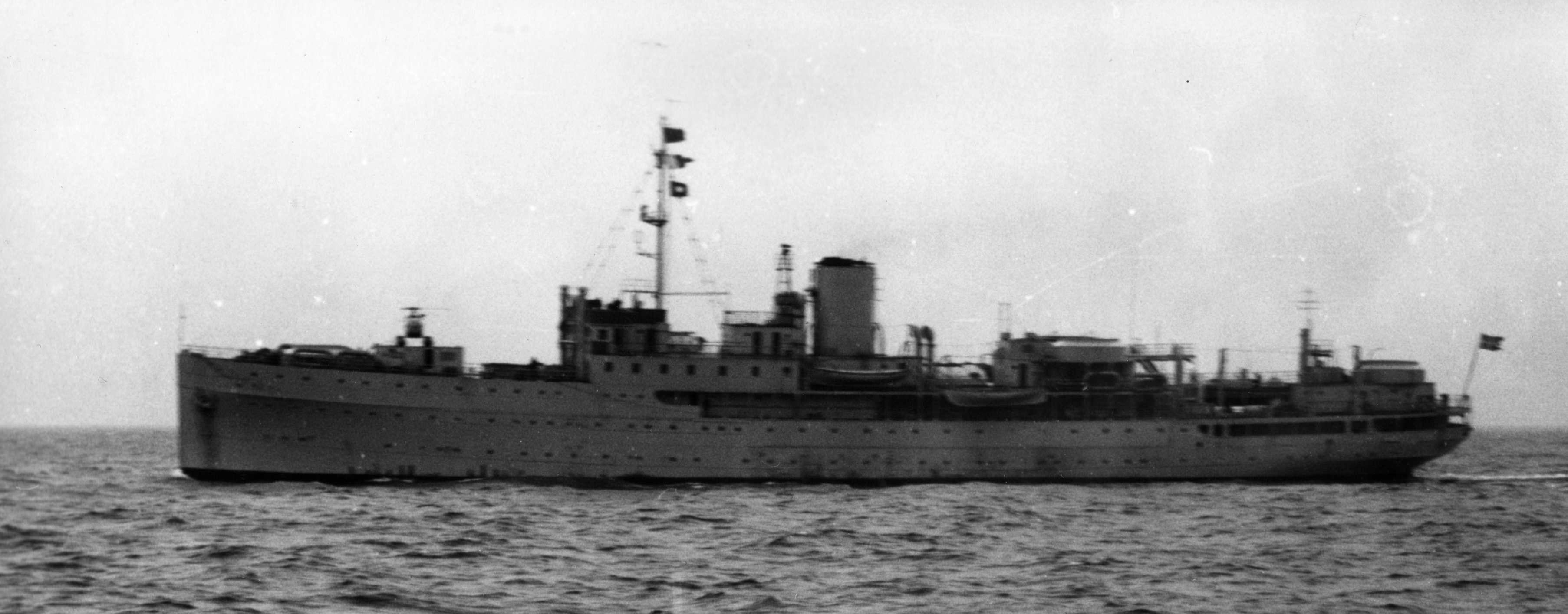 Ubåtsdepåfartyget HMS Patricia